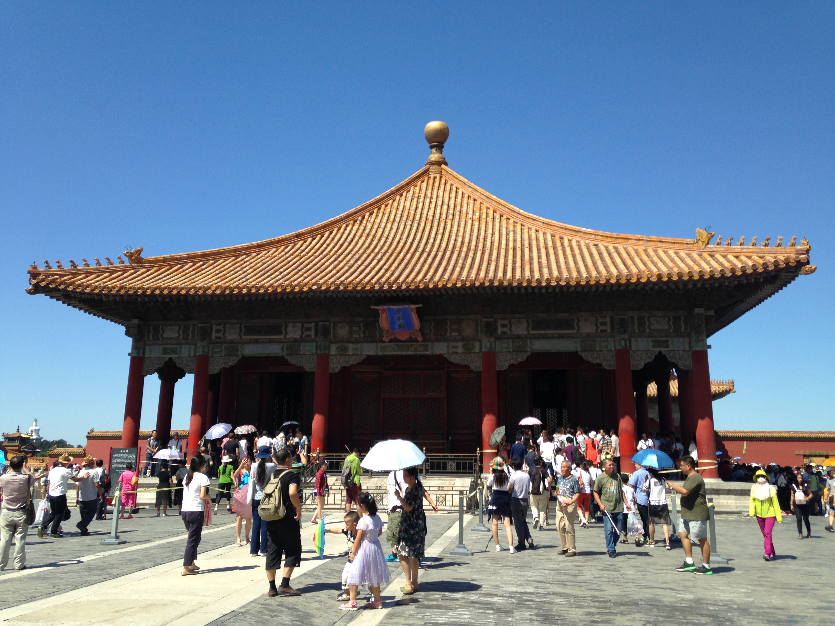 紫禁城・中和殿